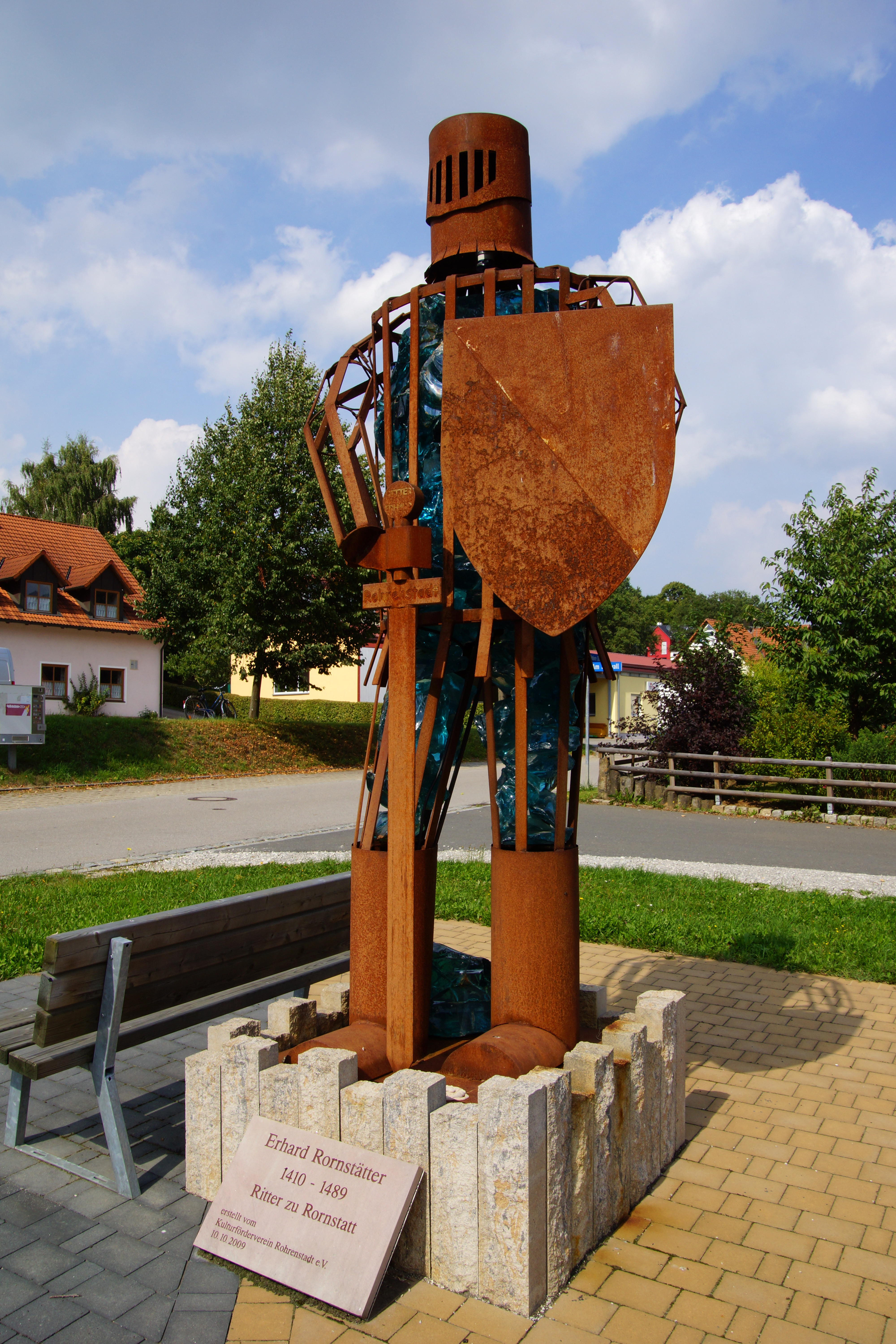 Der Ort Unterrohrenstadt bei Berg in der Oberpfalz